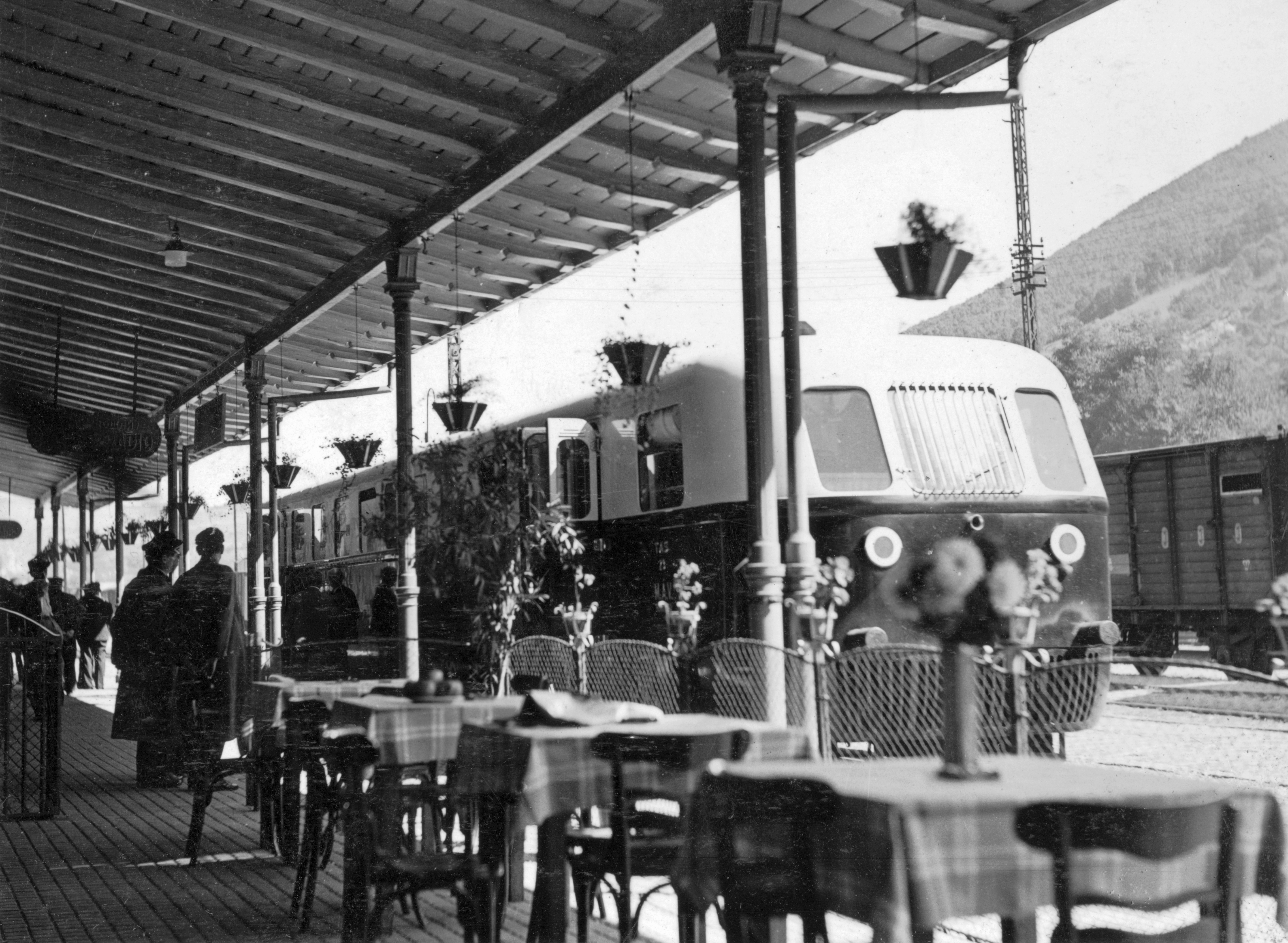 Ganz gyártmányú Árpád sorozatú (TAS) sínautóbusz. Location: Serbia, Caribrod Tags: rail, Hungarian brand, Ganz-brand, railway station buffet, restaurant Title: Ganz gyártmányú Árpád sorozatú (TAS) sínautóbusz.